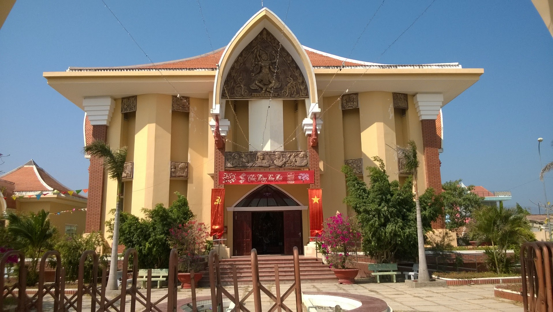 Trung tâm Trưng bày Văn hóa Chăm Bình Thuận 2